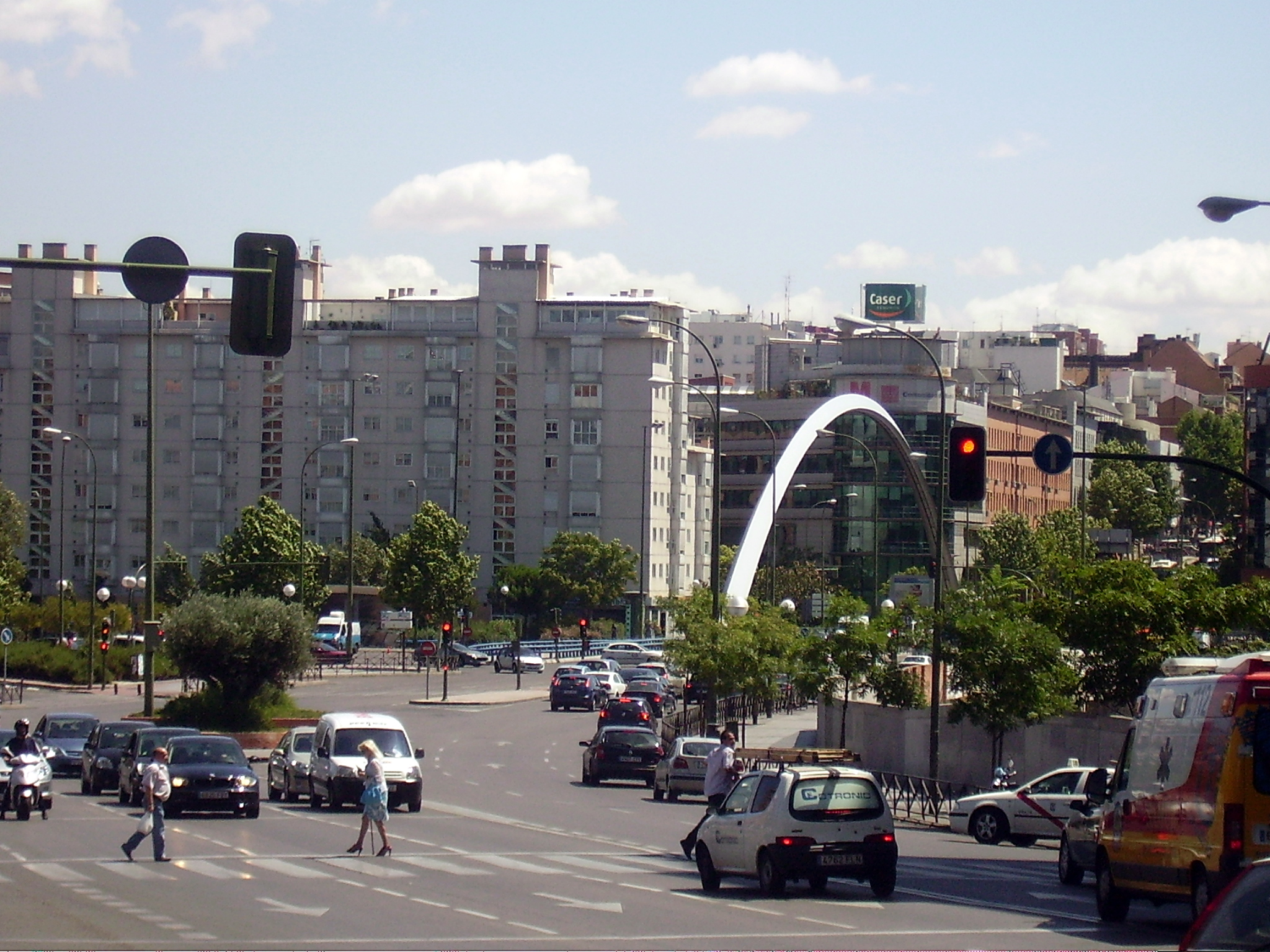 Guindalera, 28028 Madrid, Spain